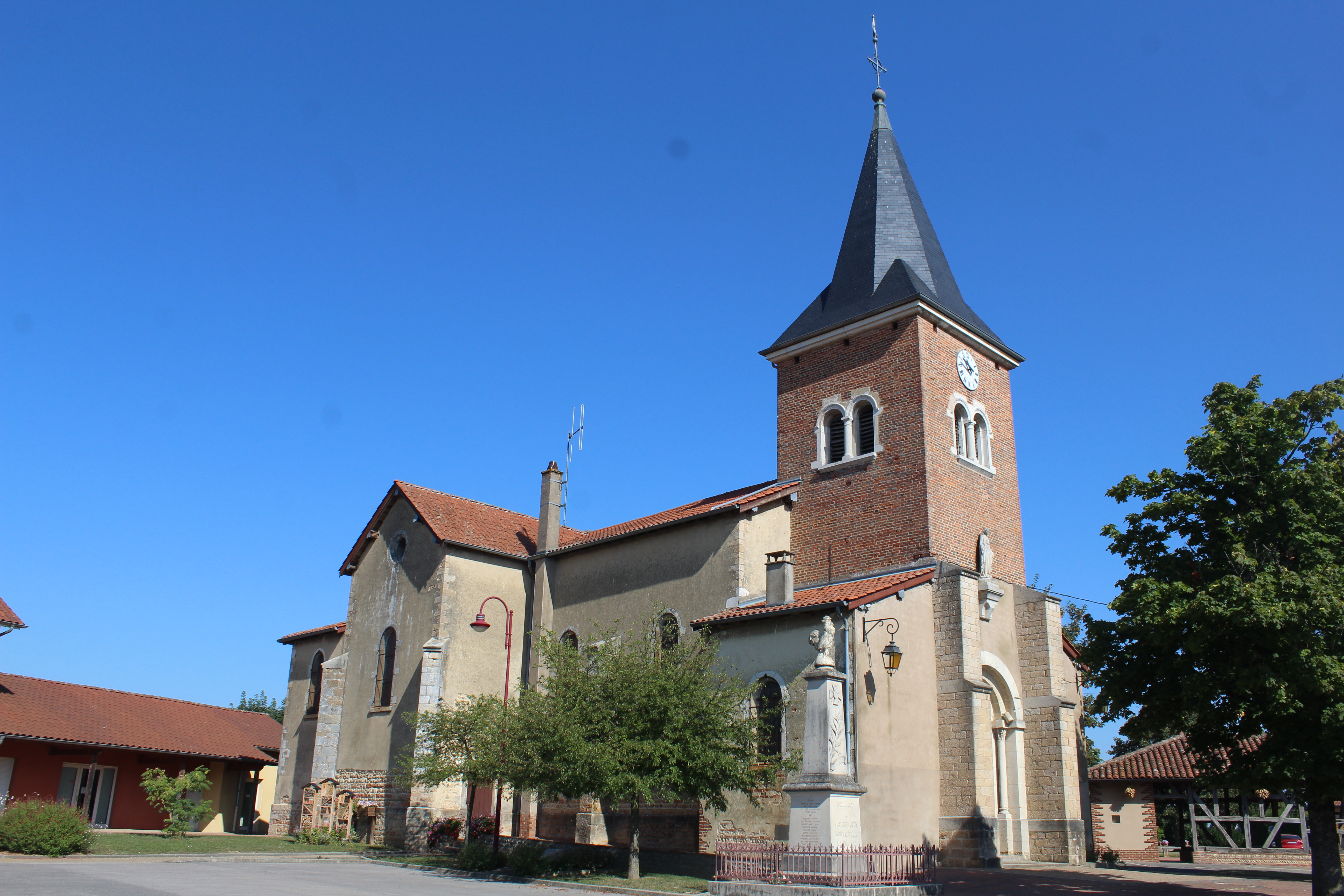 Église de la Nativité de Notre-Dame de Sulignat.